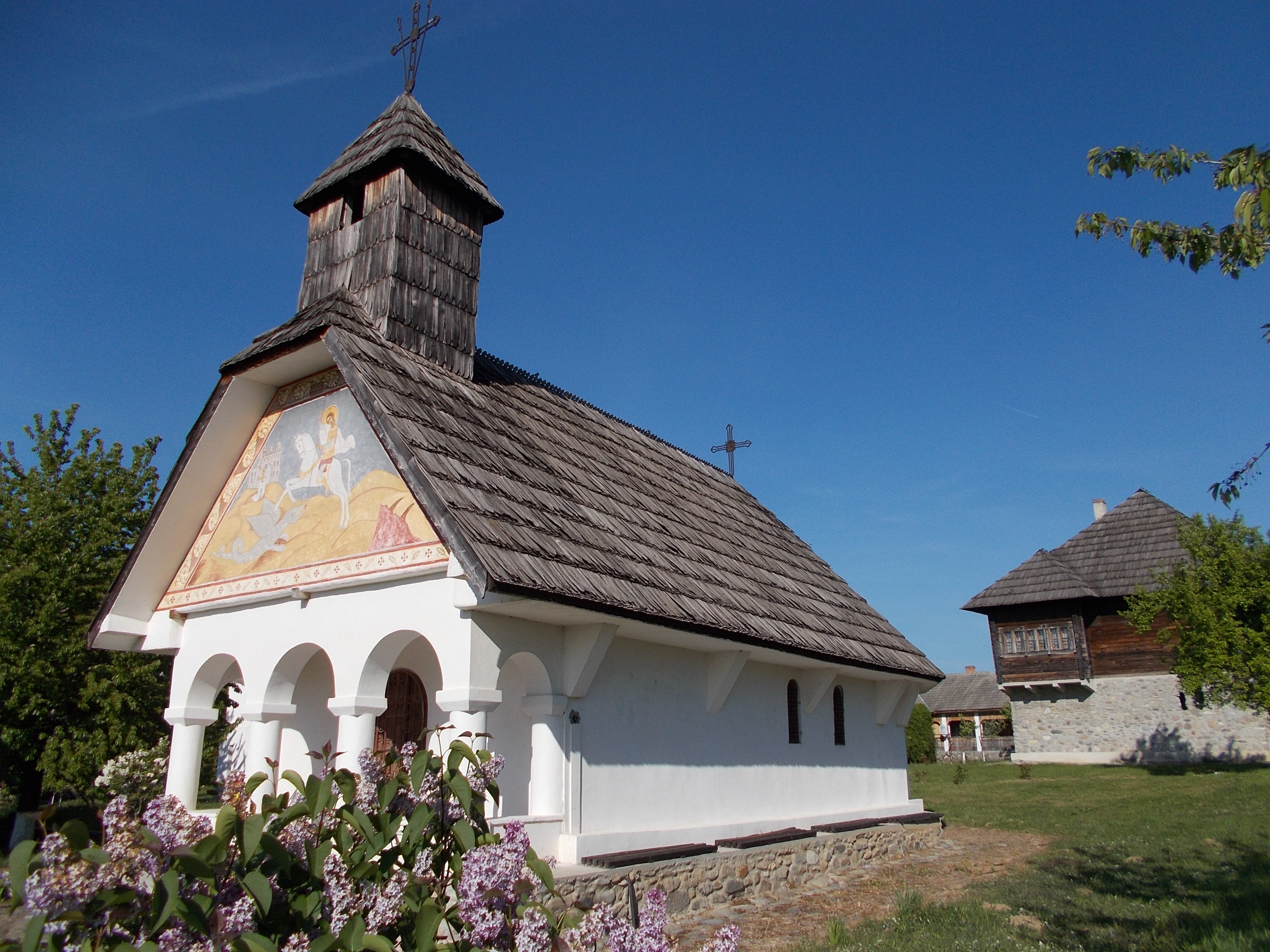 Biserica „Sf. Ioan Botezătorul” aflată în incinta muzeului arhitecturii populare gorjenești din Bumbești-Jiu (Curtișoara). Lăcașul de cult a fost ridicat la începutul secolului XIX.